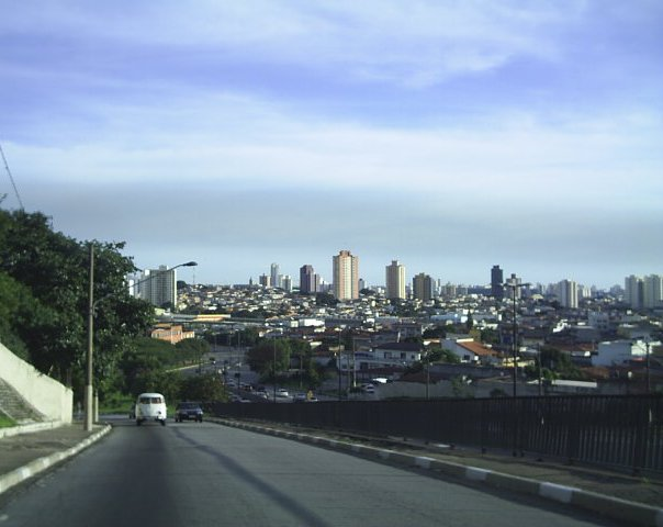 Vila Prudente vista da Água Rasa.